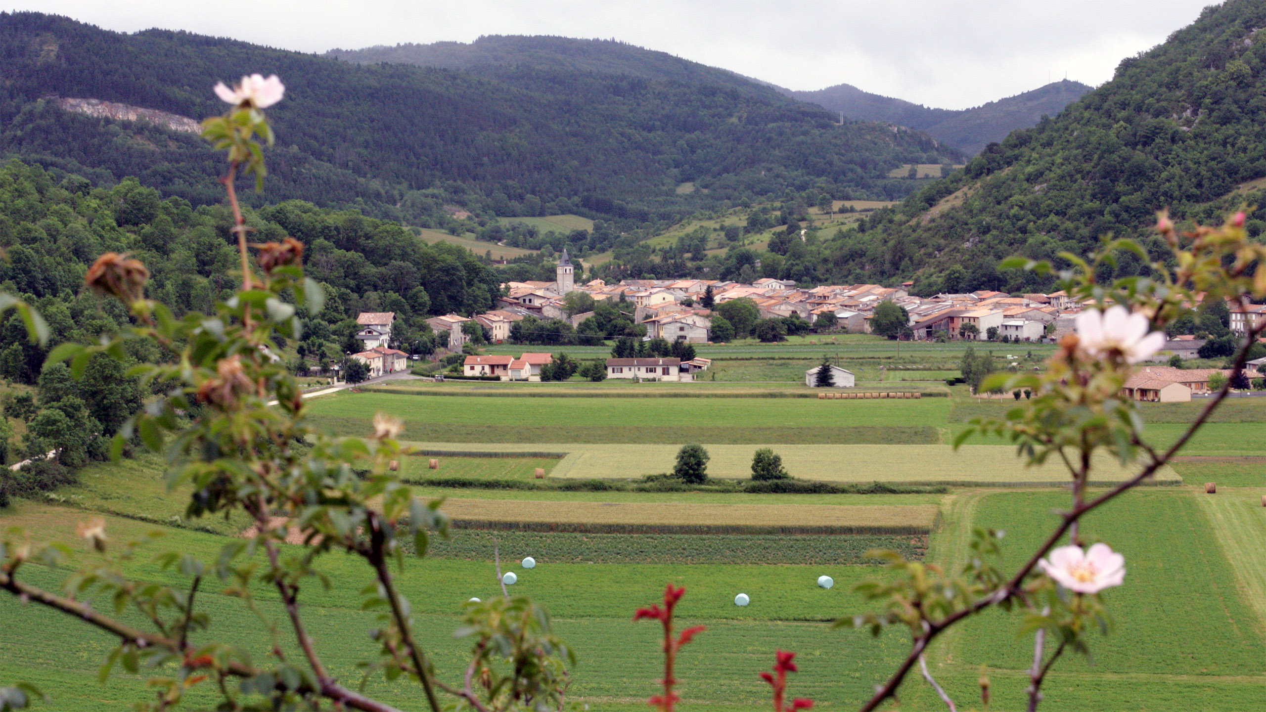 Vue du nord